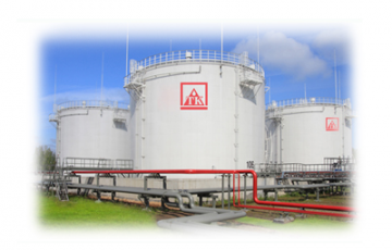 Нефтебазы ПТК